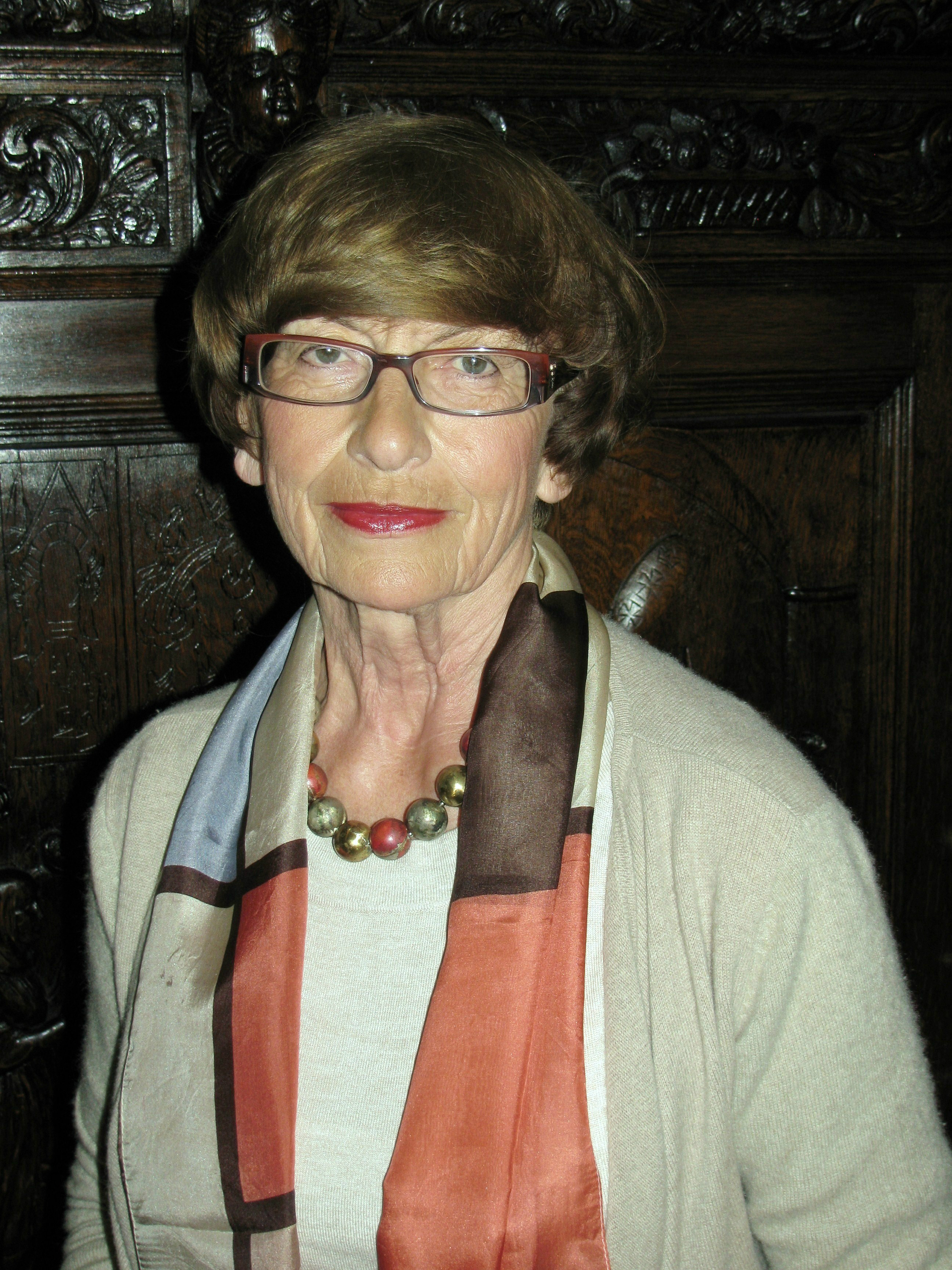 Elżbieta Sikora, polsko-francuska kompozytorka.